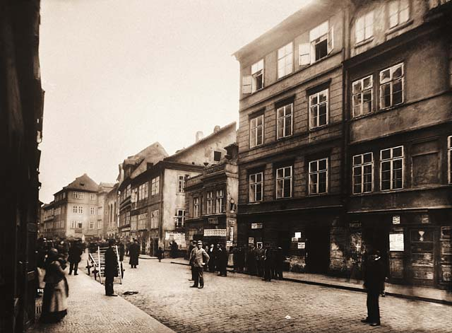 Josefovská ulice byla nejširší a nejrušnější ulicí ghetta.